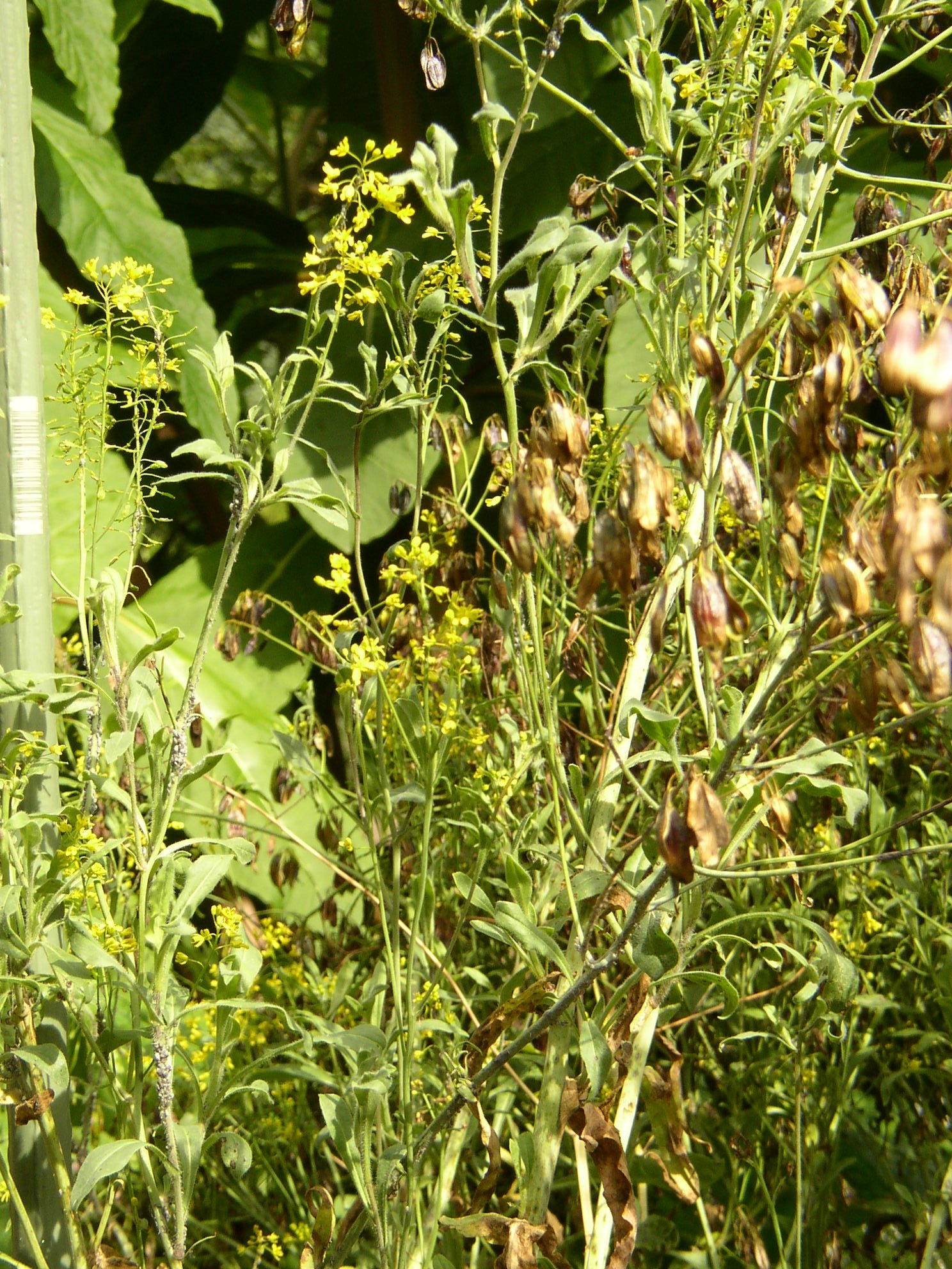 Färberwaid